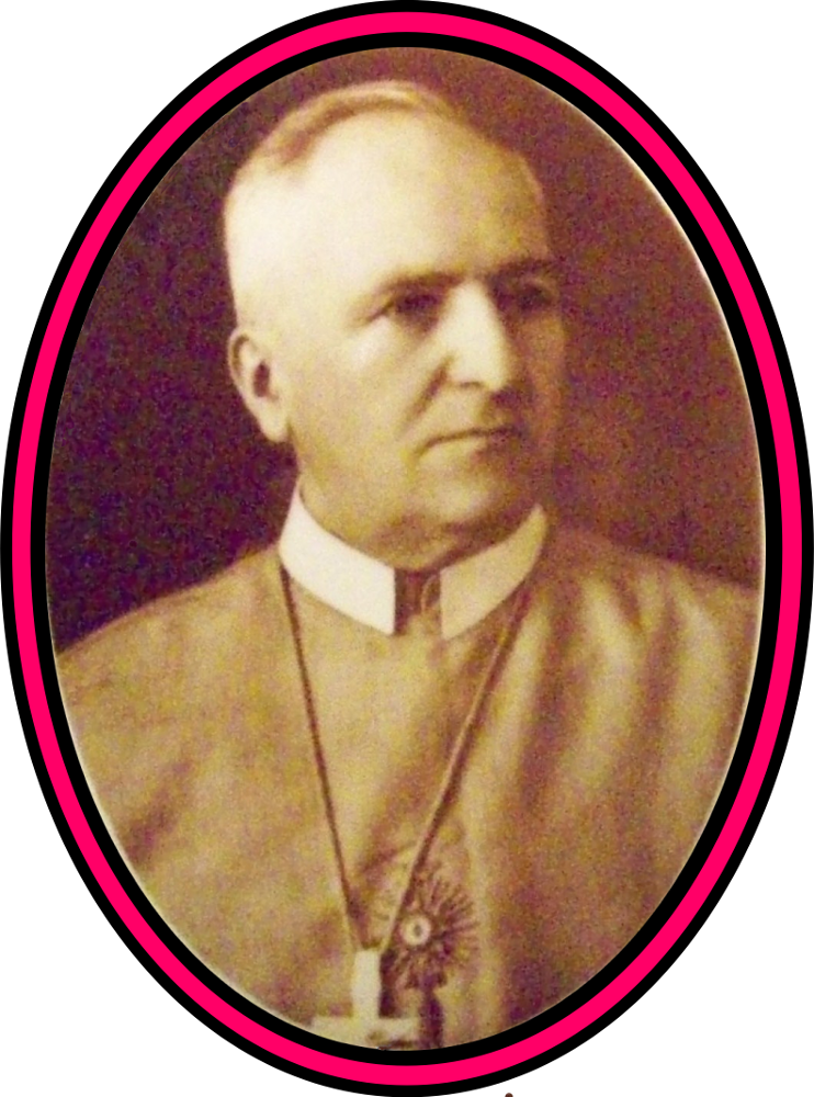 Fotografia z tablicy nagrobnej bpa. Wacława Marii Bartłomieja Przysieckiego w katedrze mariawickiej w Płocku